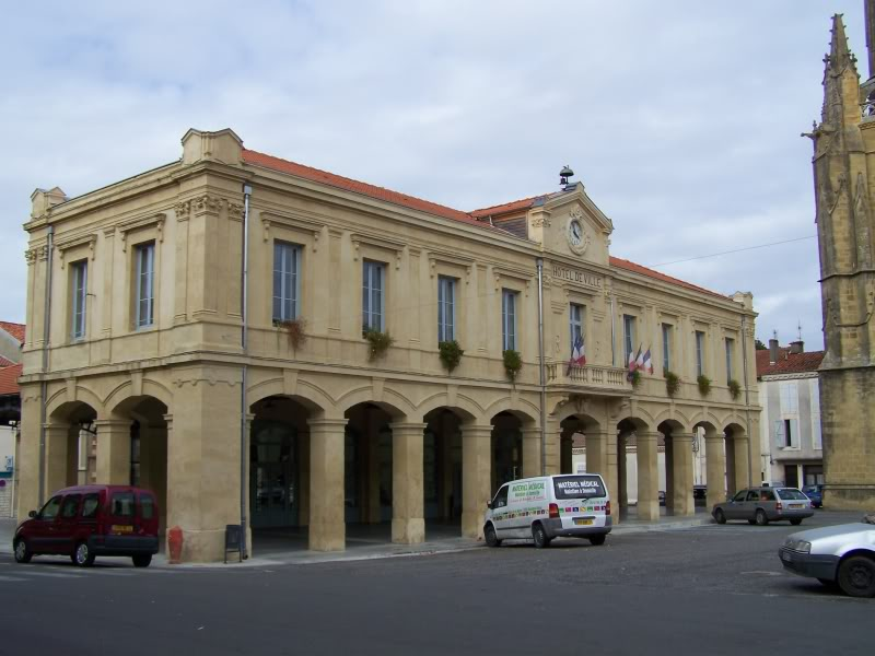 Halle-mairie de Boulogne-sur-Gesse